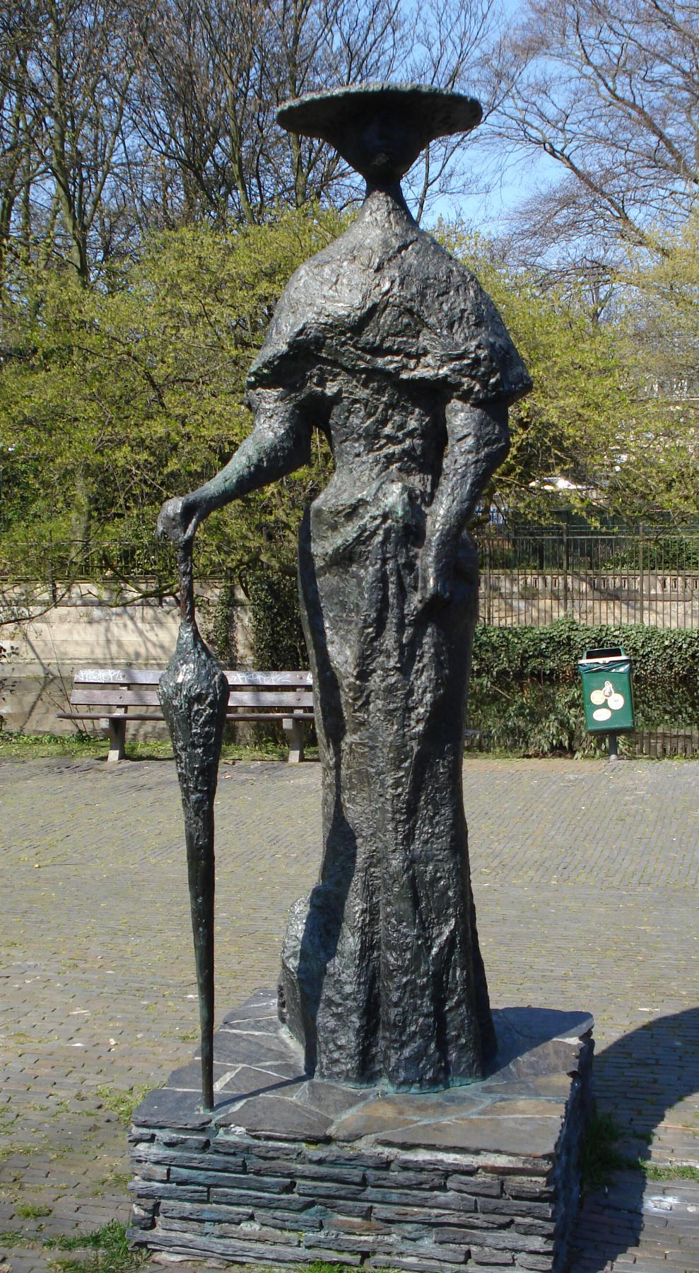 Den Haag, Groot Hertoginnelaan. Kunstwerk "Eline Vere" van Theo van der Nahmer. The Hague/The Netherlands.